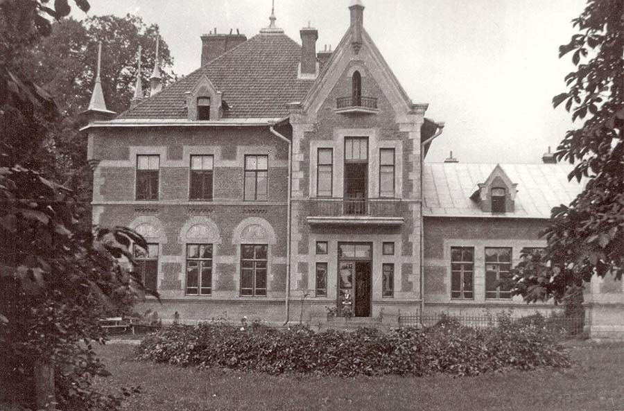 Беларуская (тарашкевіца): Лябёдка (Labiodka), сядзіба Іваноўскіх (Ivanoŭski)